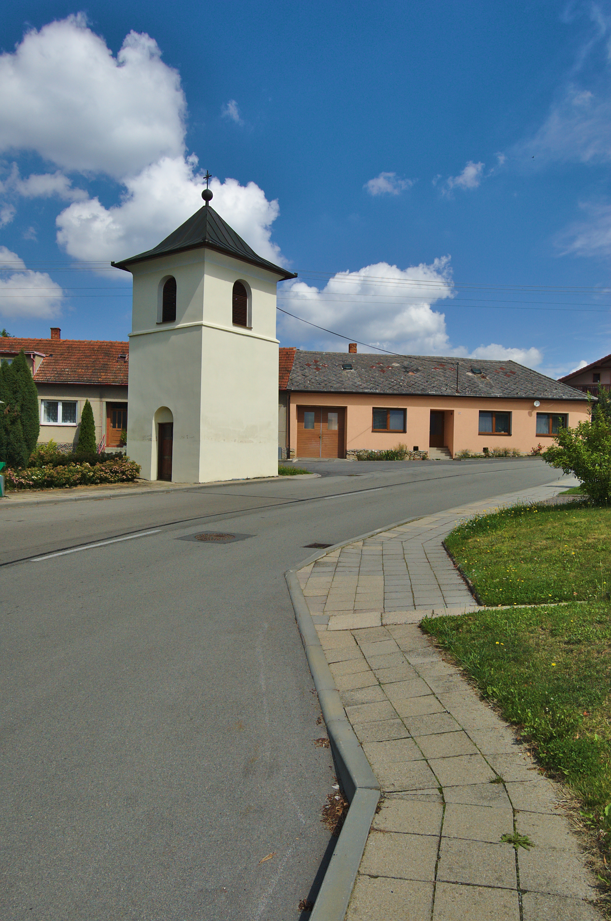 Zvonice, Okrouhlá, okres Blansko